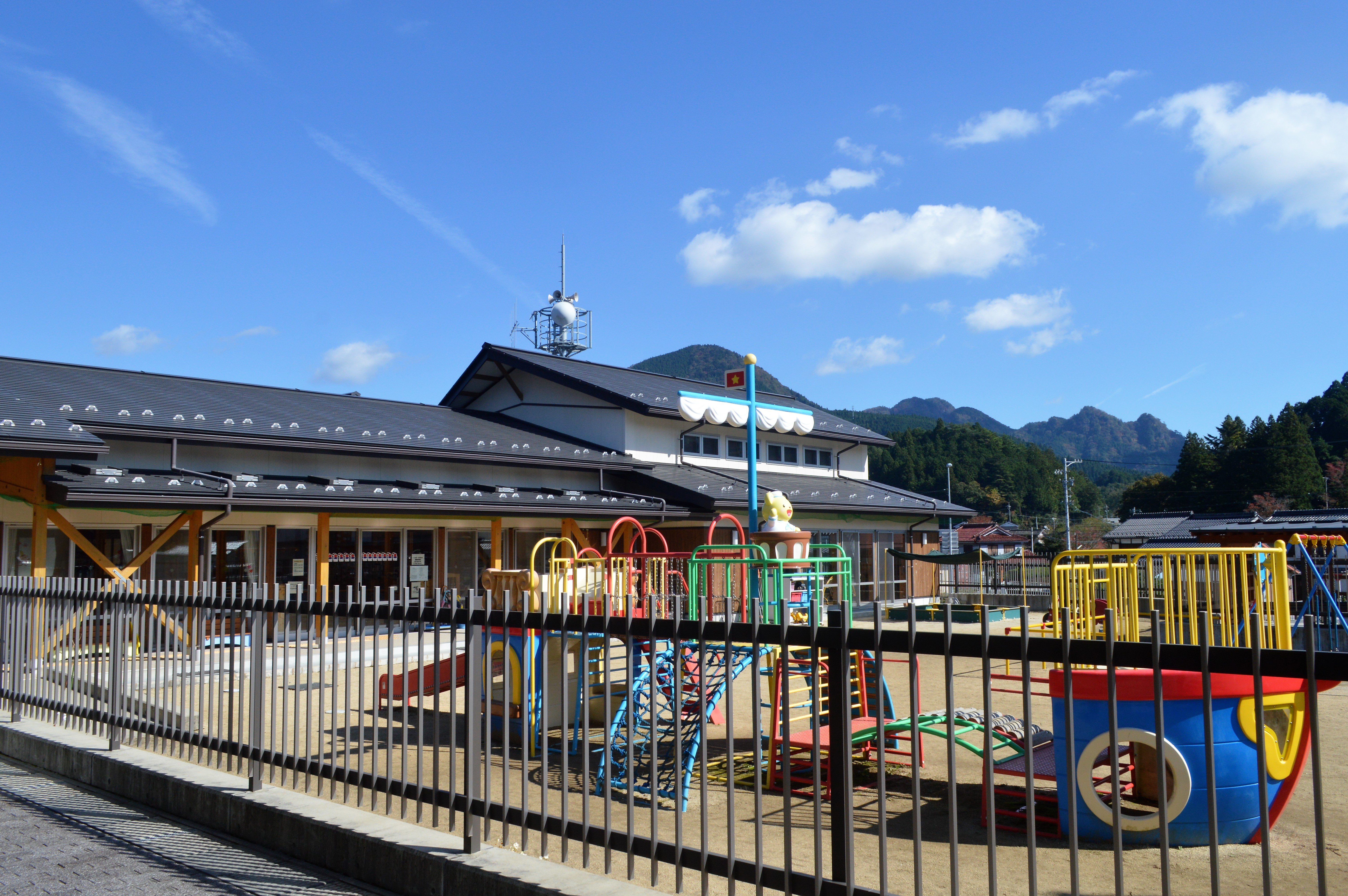 設楽町こどもセンターがある設楽町役場こどもセンター棟。